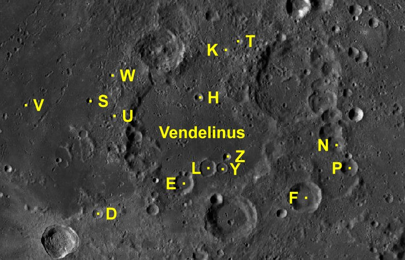 Cráter lunar Vendelinus. Cráteres satélite. (Imagen LRO)